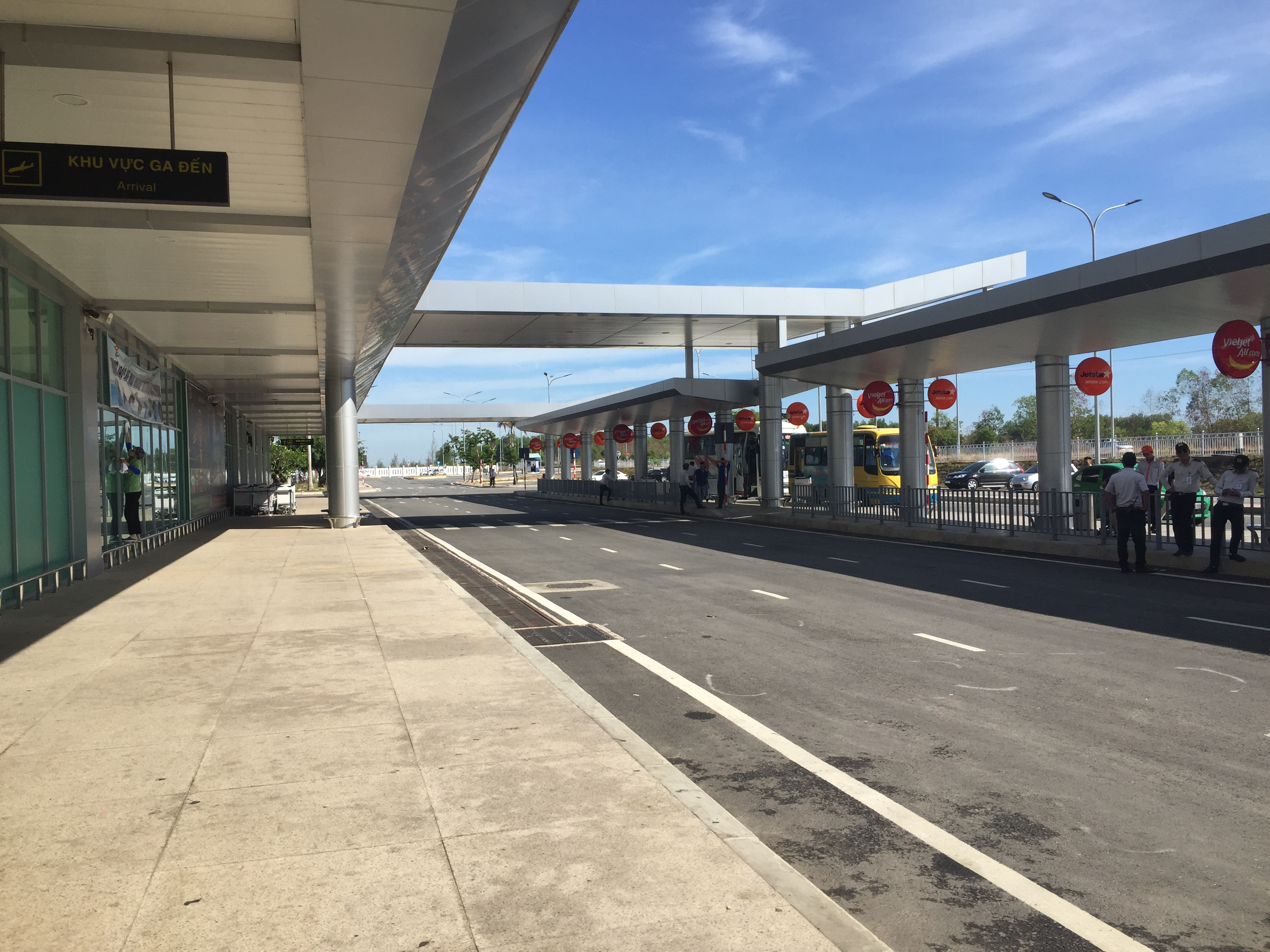 Chu Lai New Airport arrival hall